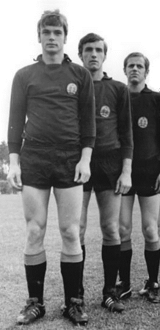 Title: XXIV. UEFA-Turnier, DDR-Fußball-Juniorennationalmannschaft Factual corrections and alternative descriptions are encouraged separately from the original description. Additionally errors can be reported at this page to inform the Bundesarchiv. Original historic description: Zentralbild-Mittelstädt-19.5.71-ma-Berlin: XXIV. UEFA-Turnier der Fußball-Junioren vom 22. bis 30.5.71 in der CSSR. Die DDR-Kandidaten v.l.n.r.: Bernd Jakubowski, Bernd Wargos, Peter Fritzsche (alle Torwart), Udo Schmuck, Rüdiger Schnuphase, Wolfgang Rahn, Wolfgang Altmann, Detlef Kranz, Axel Tyll, Jürgen Pommerenke, Matthias Blaseck, Dietrich Kehl, Albert Ullrich, Norbert Schumann, Bernd Tramp, Detlef Robitzsch, Klaus Müller, Ekkehardt Märzke und Waldemar Köppe. Nicht nominiert wurden die Spieler Fritzsche, Blaseck und Ullrich.